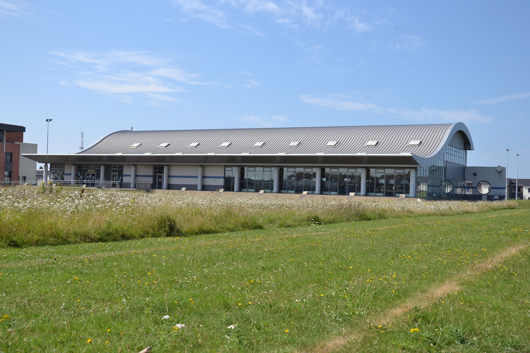 Université du Littoral Côte d'Opale - Bibliothèque Universitaire